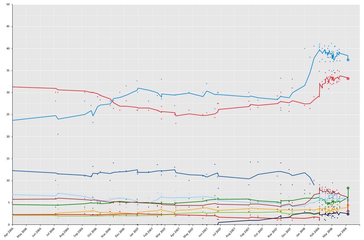 Sondaggi elettorali con media a 4 punti.